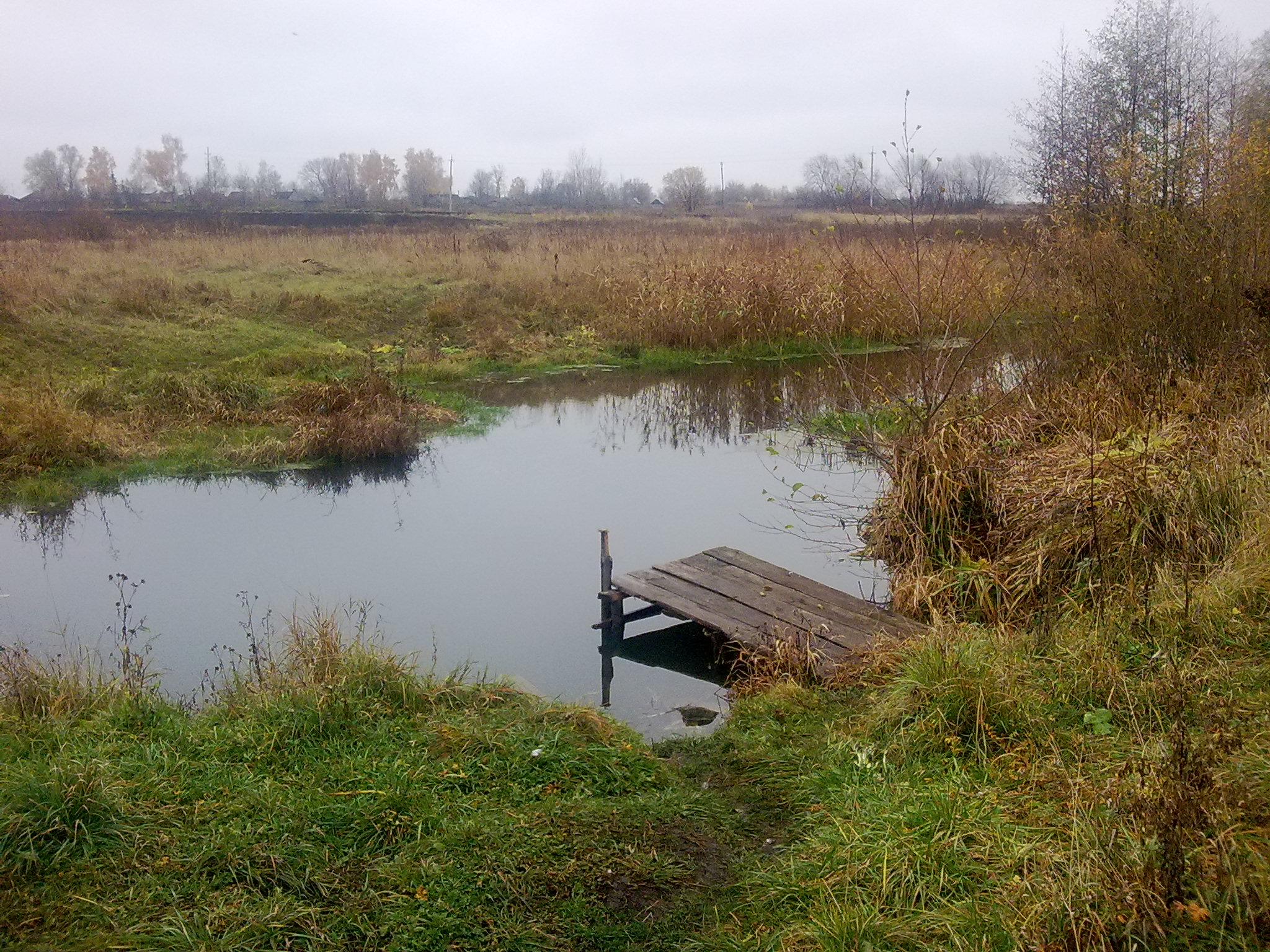 Река Изовка, бытовой мост. Вид с села Советское (Верхние Пупки).